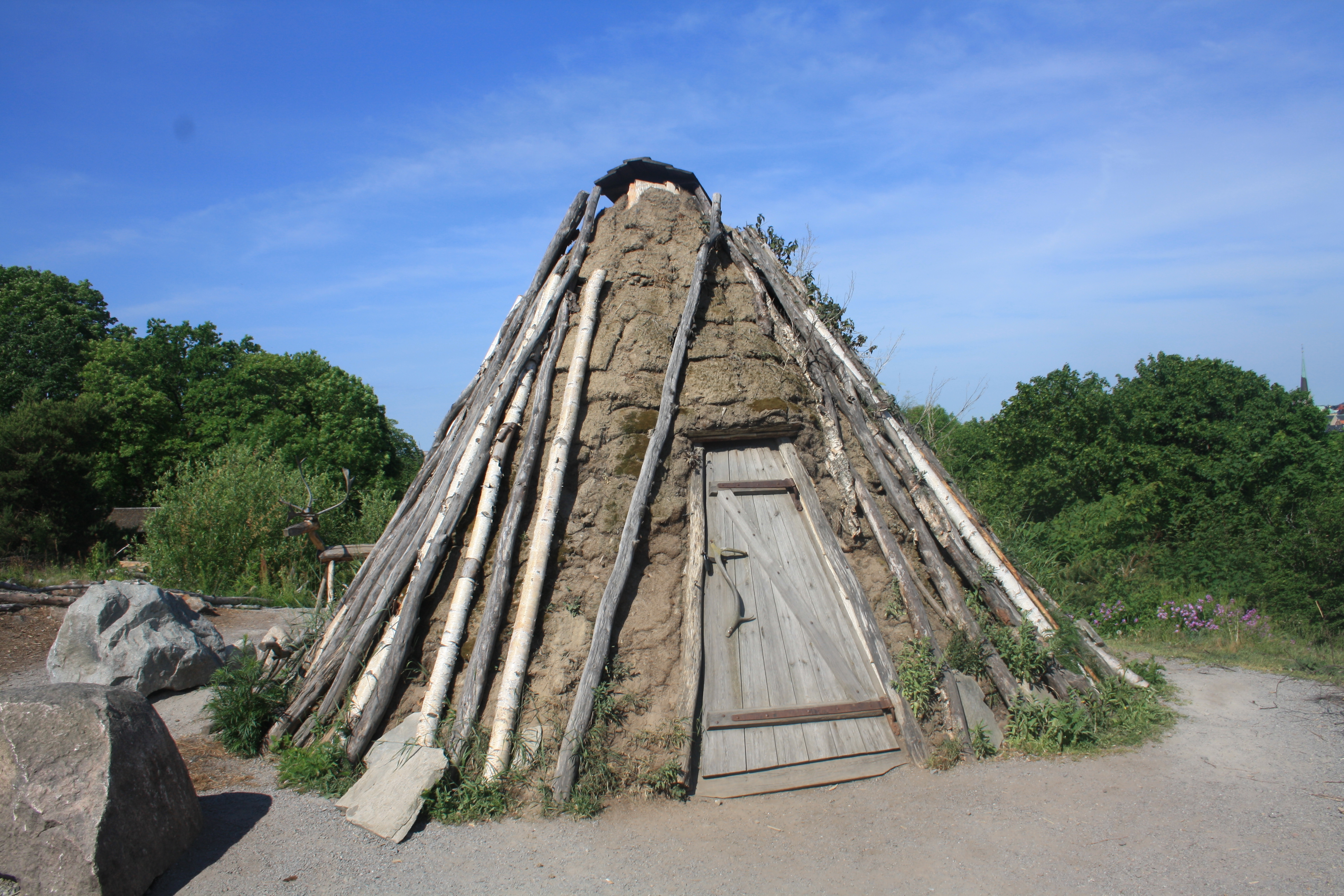 Sami hut, Skansen in Stockholm, Sweden at National Day of Sweden.